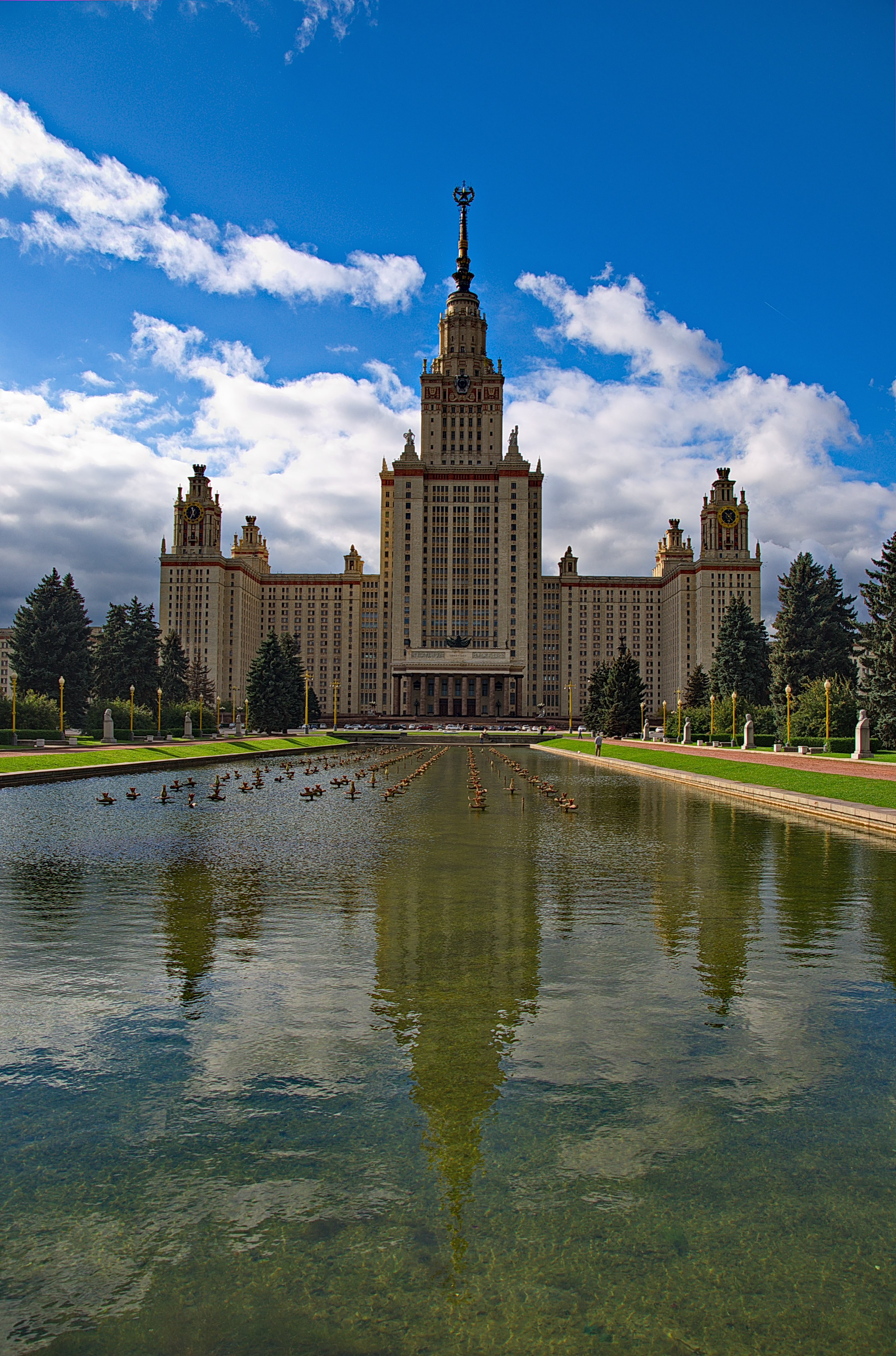 0047 - Moskau 2015 - Lomonossow Universität